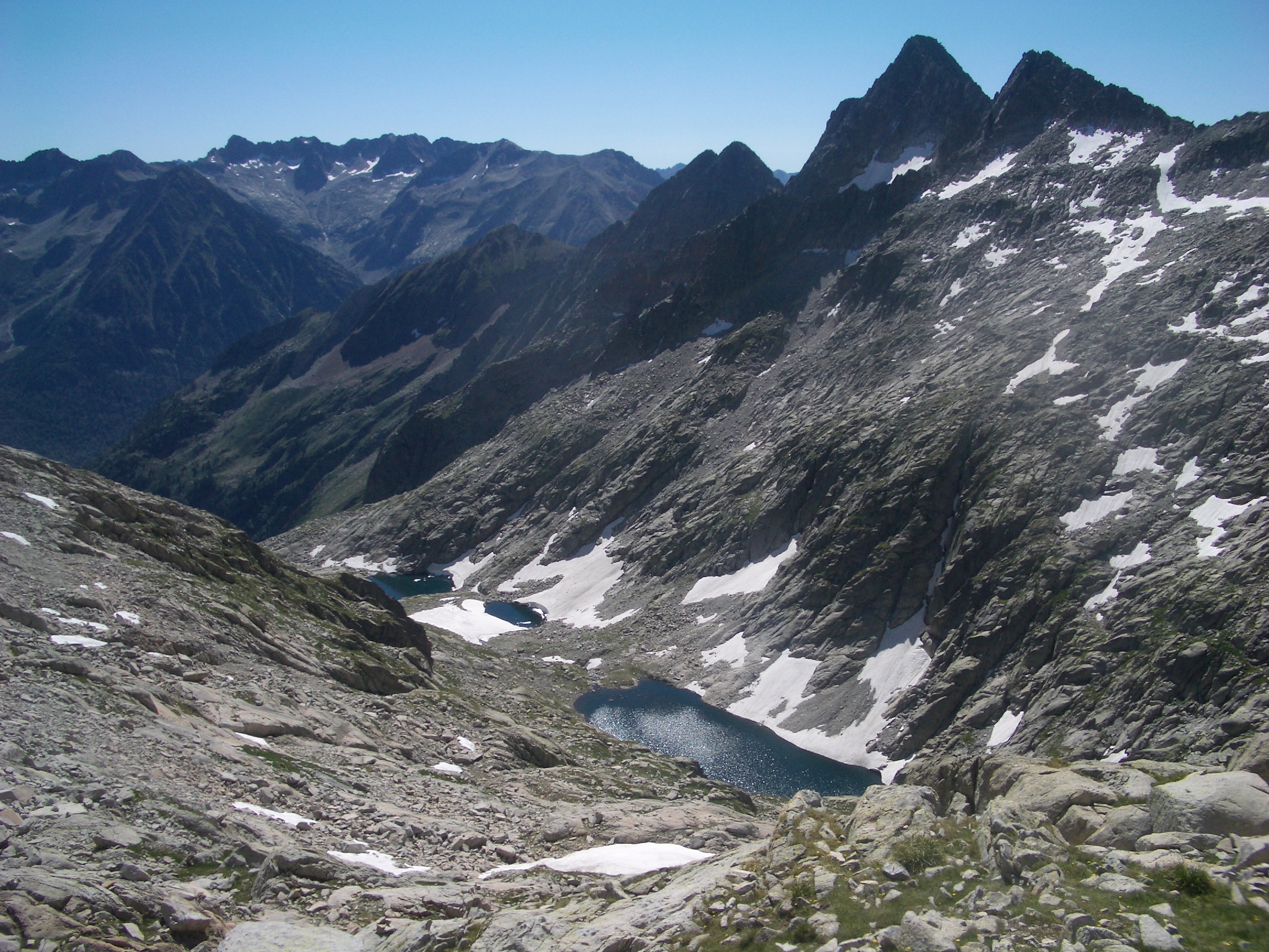 Lagos glaciares situados en el Valle de Molières This is a a photo of a wetland in Catalonia, Spain, with id: IZHC-17000525 This is a a photo of a natural area in Catalonia, Spain, with id: ES510088